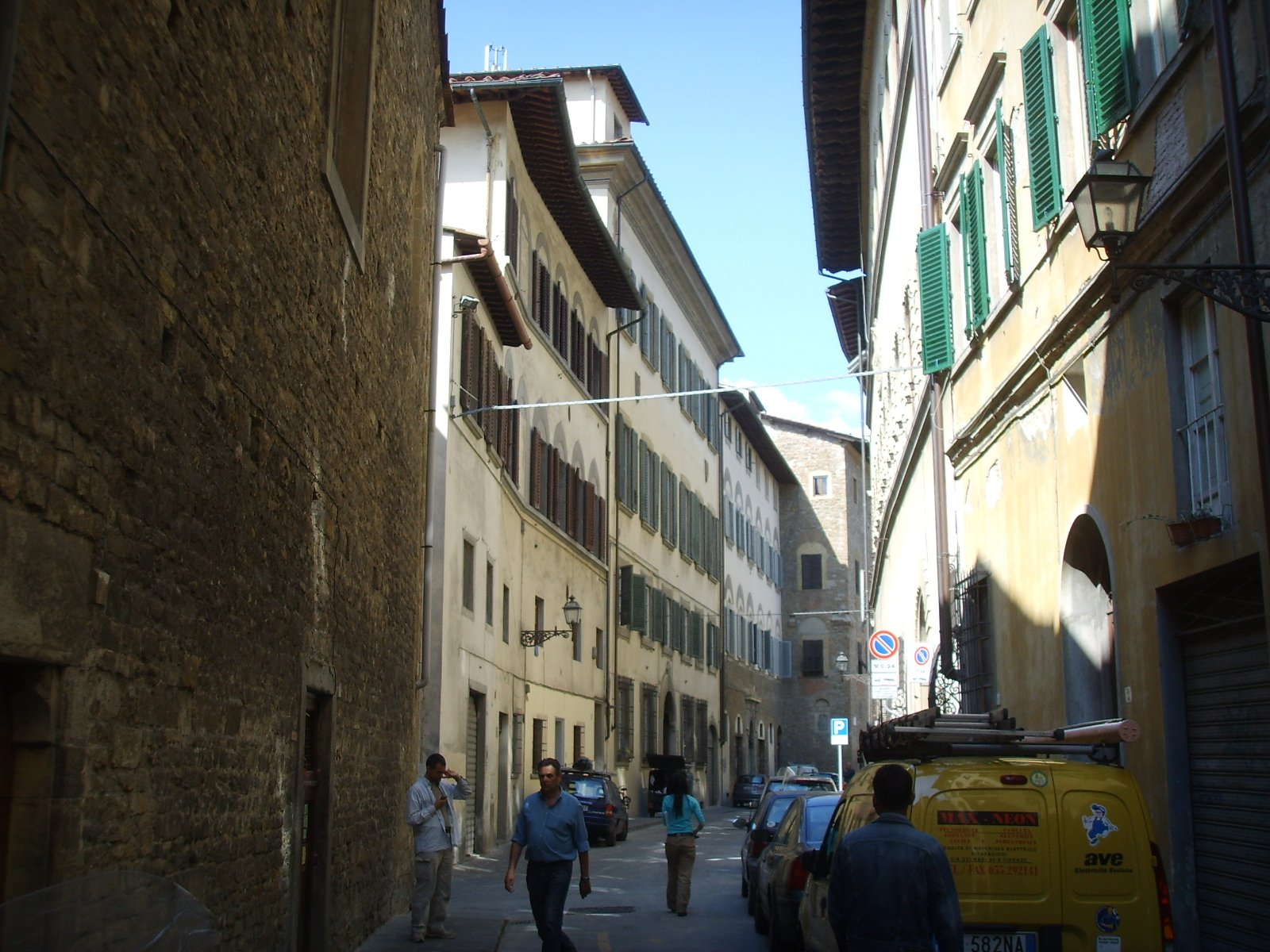 Via de' rustici